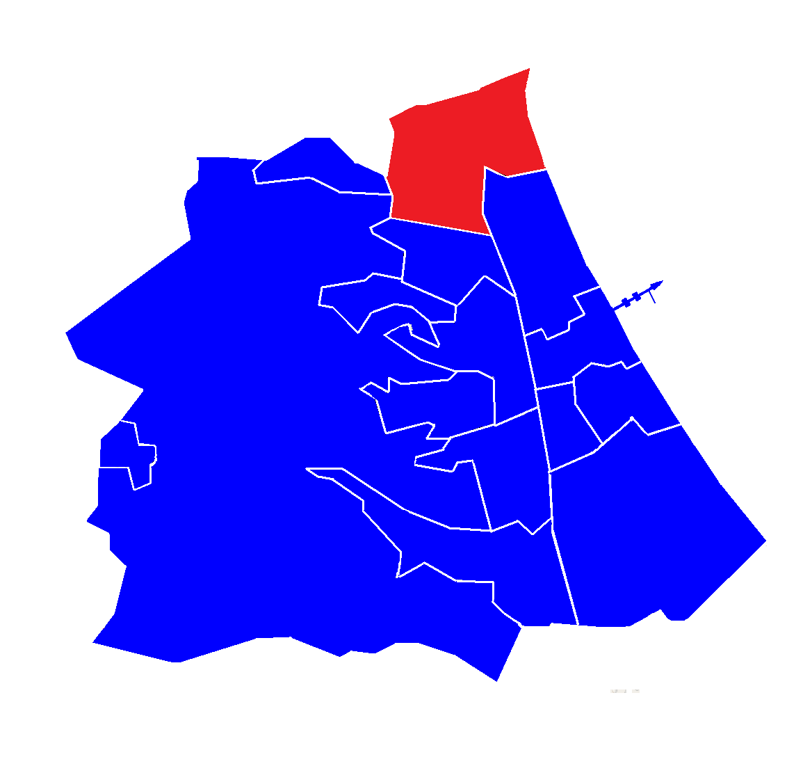 Mapa Kamienny Potok - dzielnica Sopotu